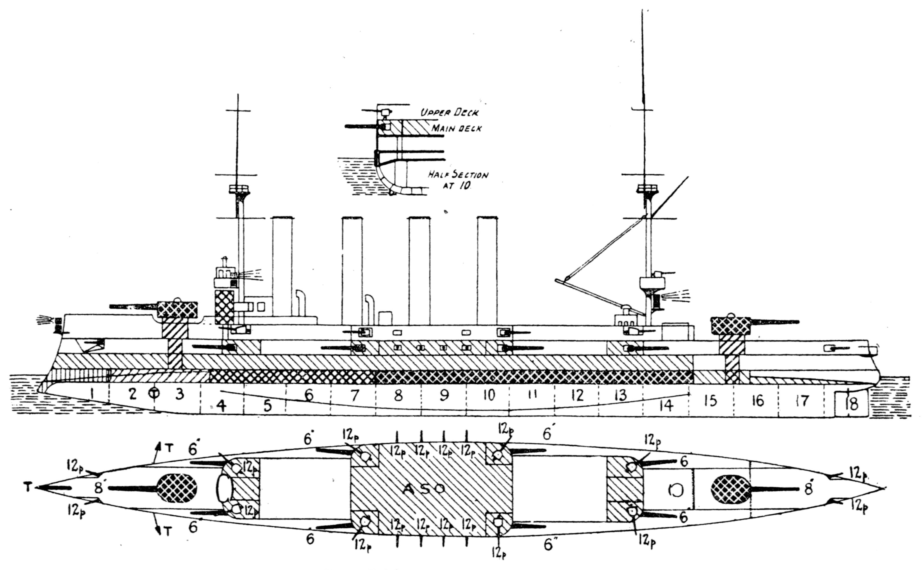 ロシア帝国海軍の装甲巡洋艦バヤーン、のちの大日本帝国海軍の巡洋艦阿蘇